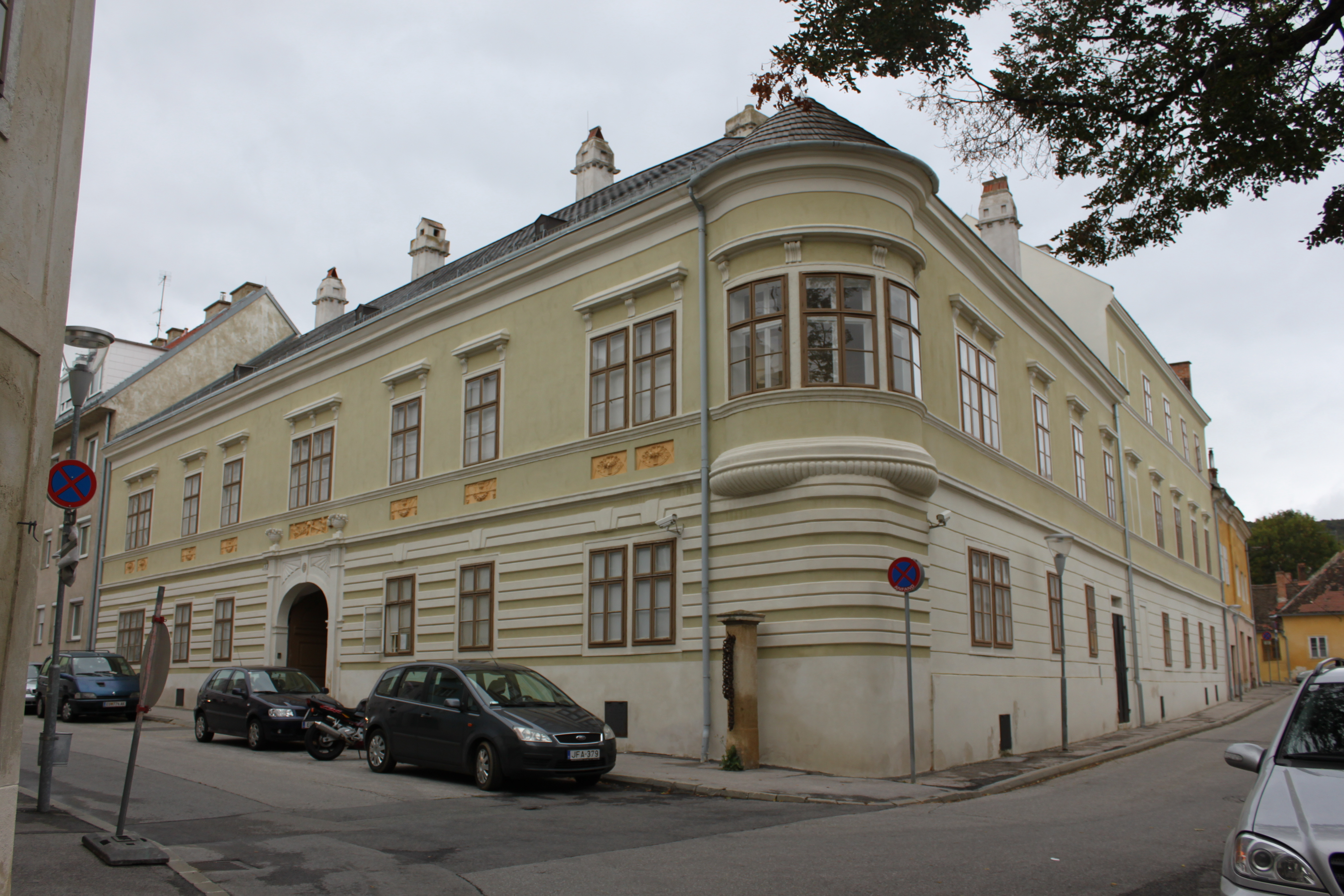 Synagoge, Jüdisches Museum, Wertheimerhaus